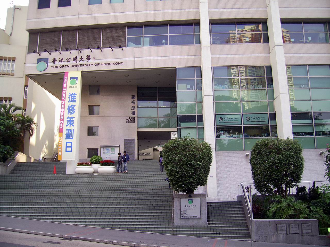 香港公開大學